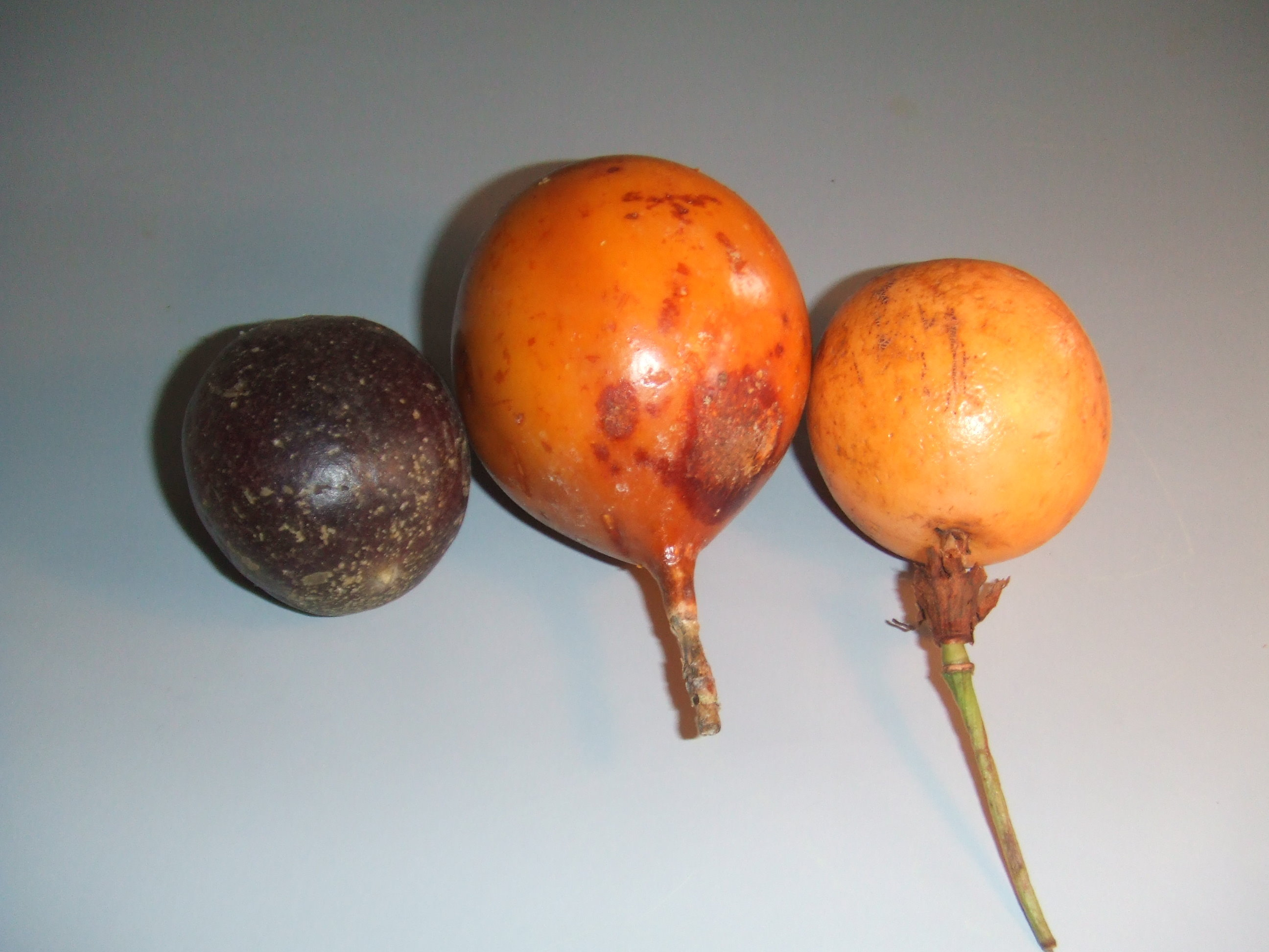 Drie soorten passievrucht, van links naar rechts:Passiflora edulis forma edulis, Passiflora ligularis en Passiflora nitida'????